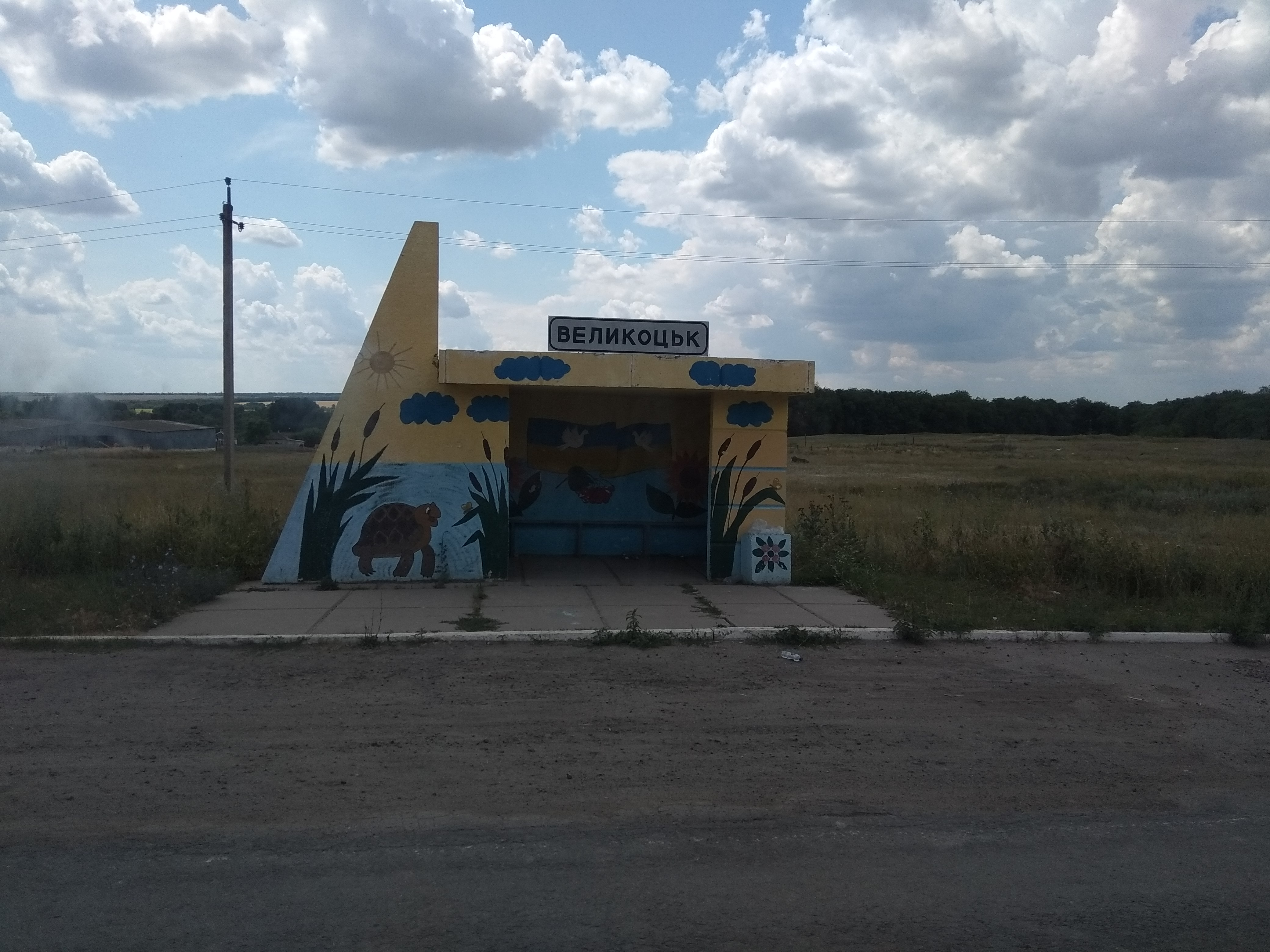 Зупинка у селі Великоцьк, Міловський район Луганська область, Україна